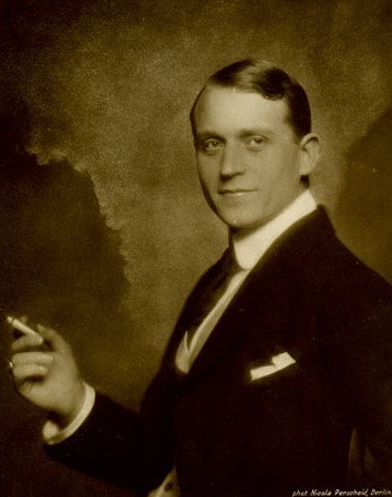 Fotografie des schwedischen Schauspielers Nils Chrisander